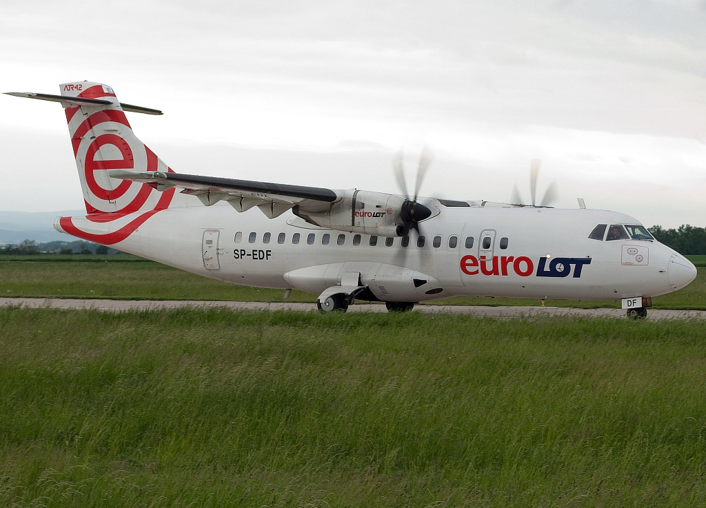 Lietadlo ATR 42-500 od spoločnosti EuroLOT na letisku v Bratislave